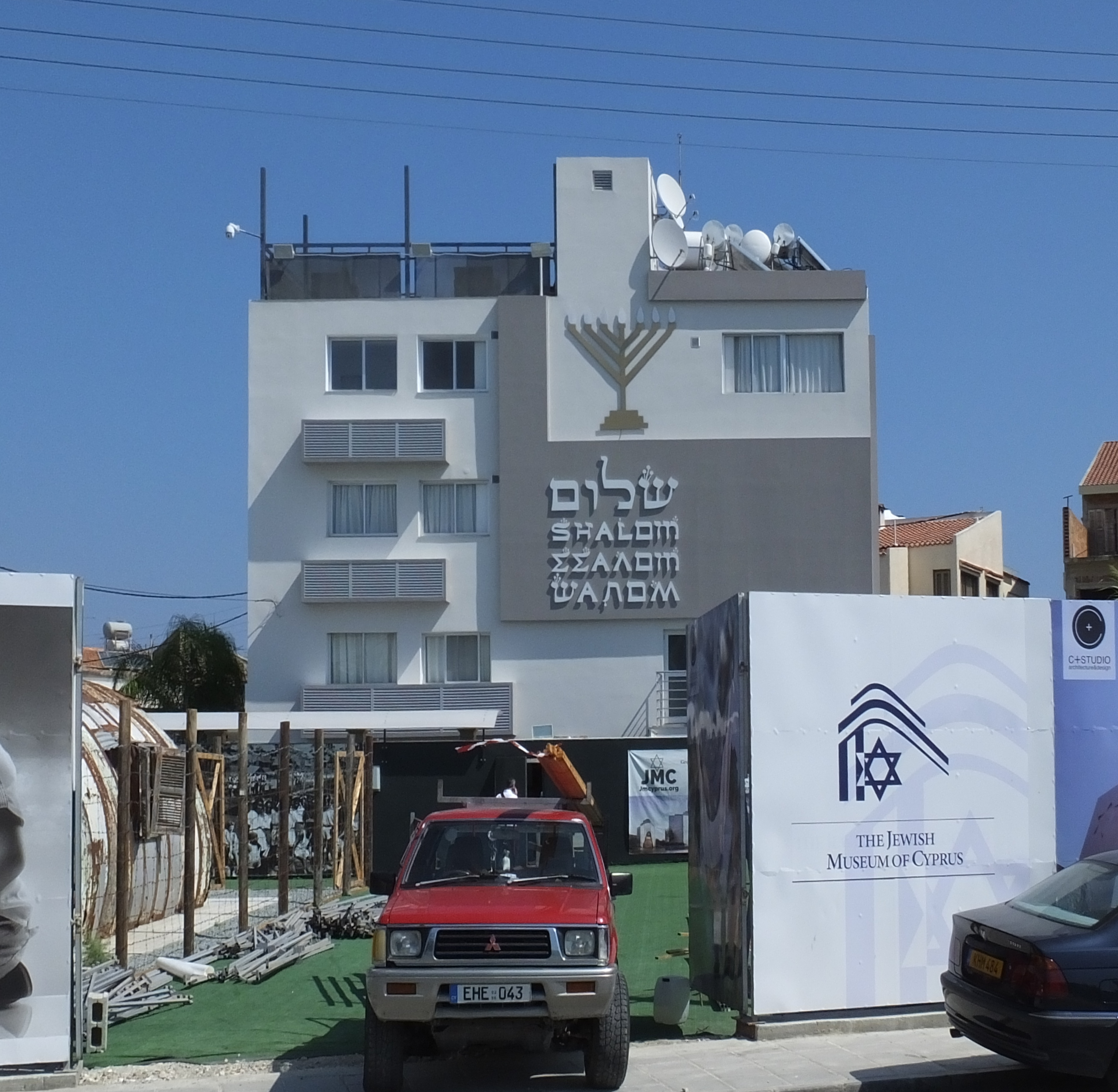 Synagoga w Larnace, ul. Apollodorou 4